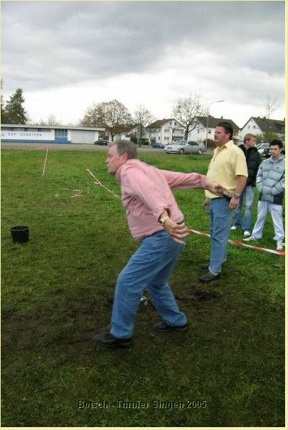 Bootsch-Turnier Singen 2005, Werfen des Bootschs